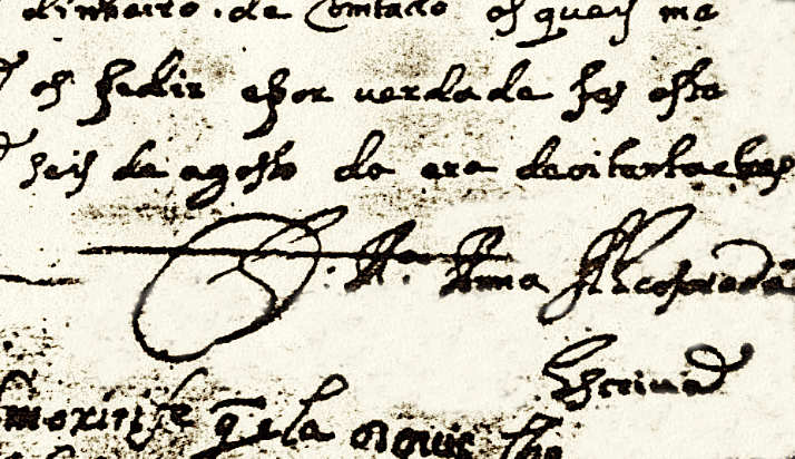 signature de Marianne Alcoforado